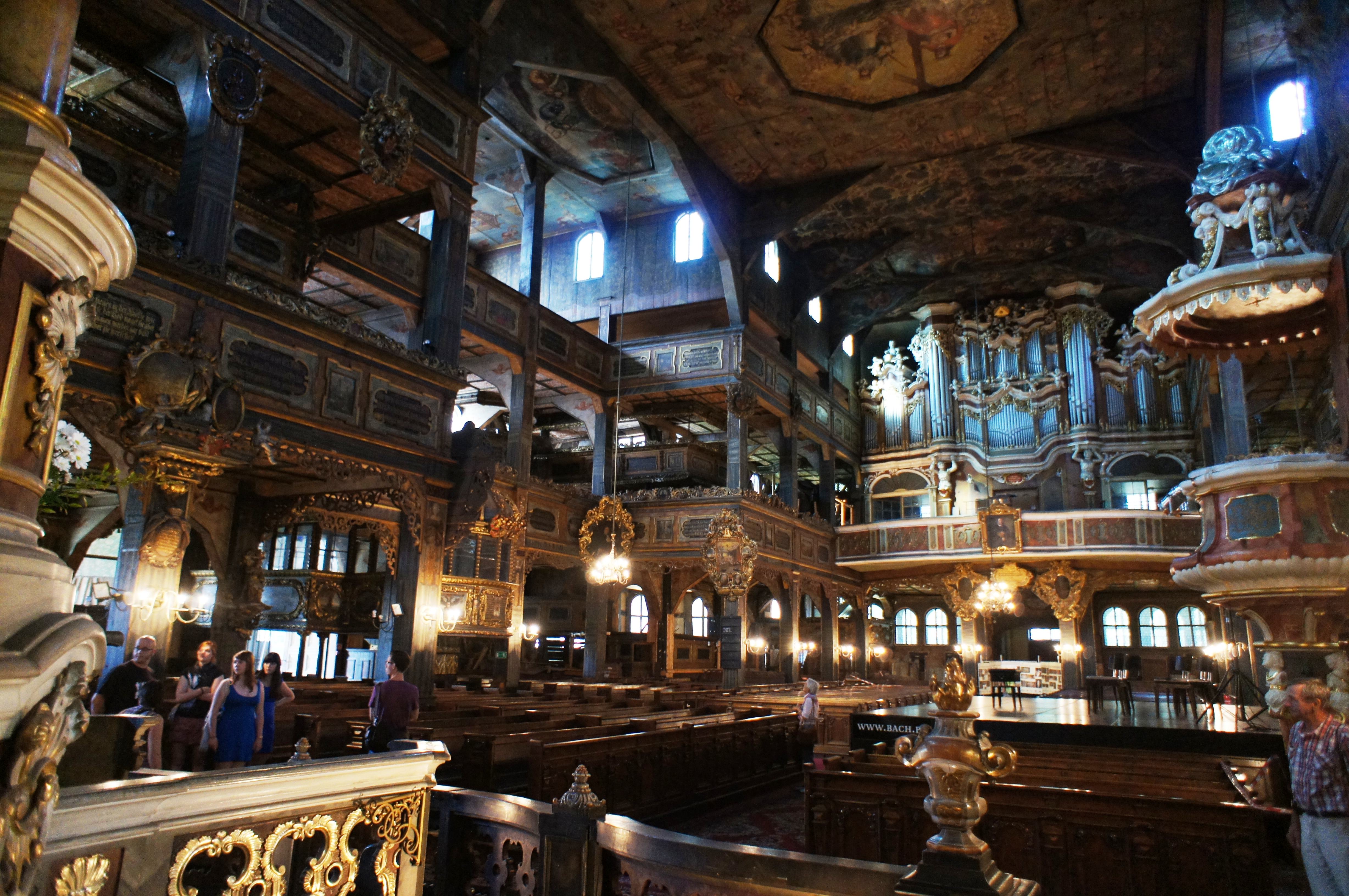 Kościół Pokoju w Świdnicy - wnętrze z amboną (zabytek A/1677/131 z dn. 2.01.1950)